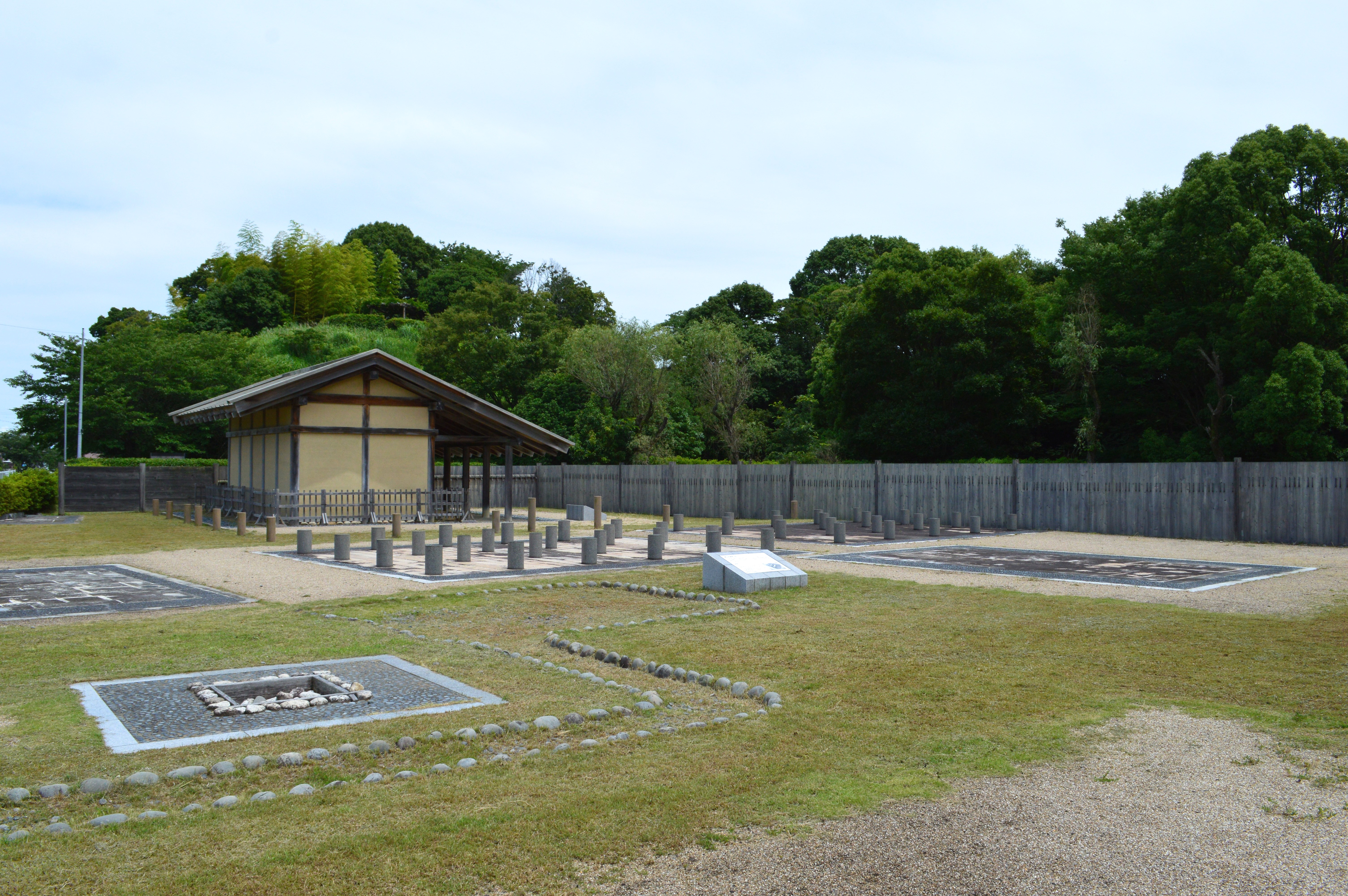 志太郡衙跡 井戸と建物群